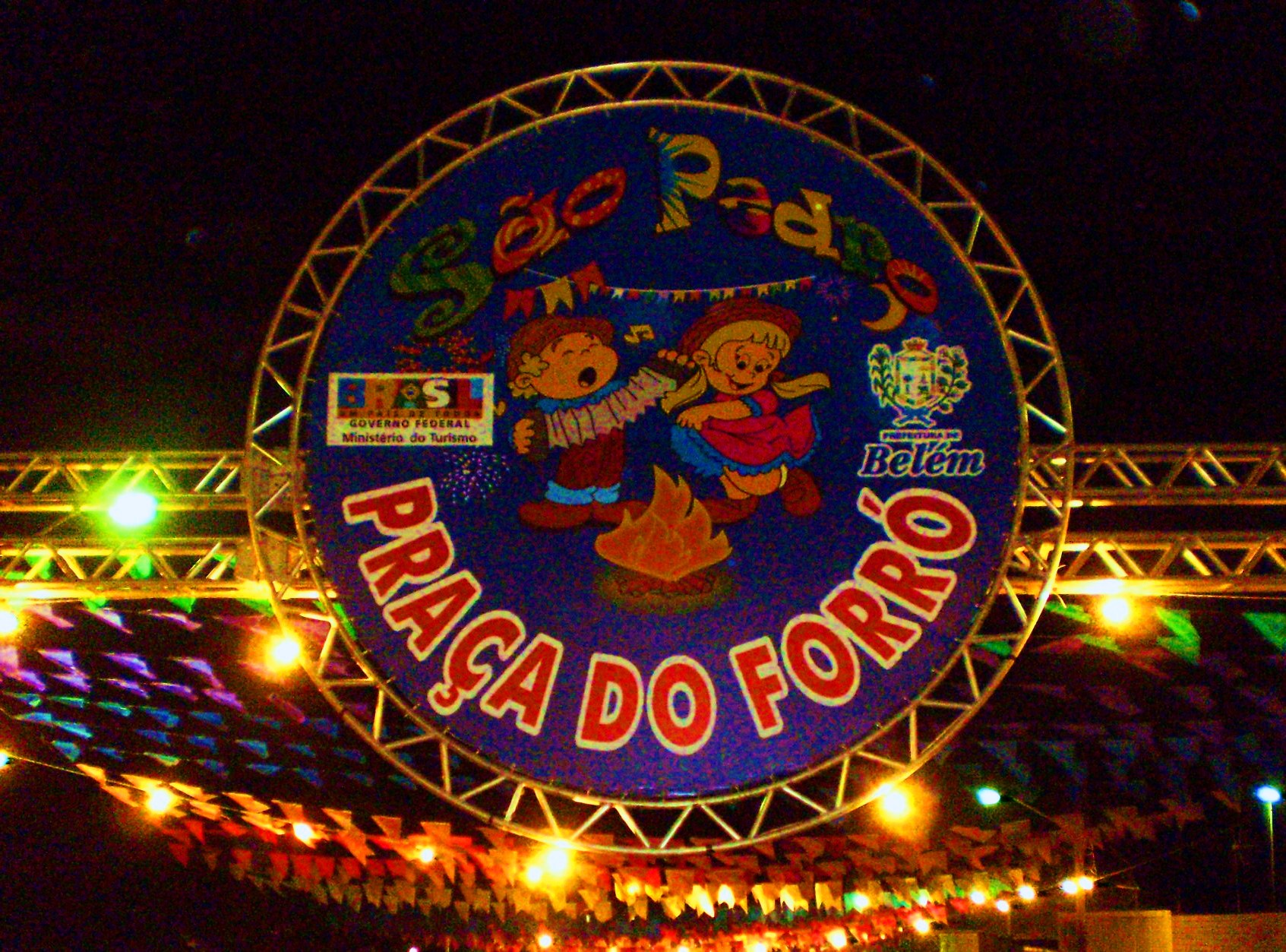 Slogan da Praça do Forró 2009